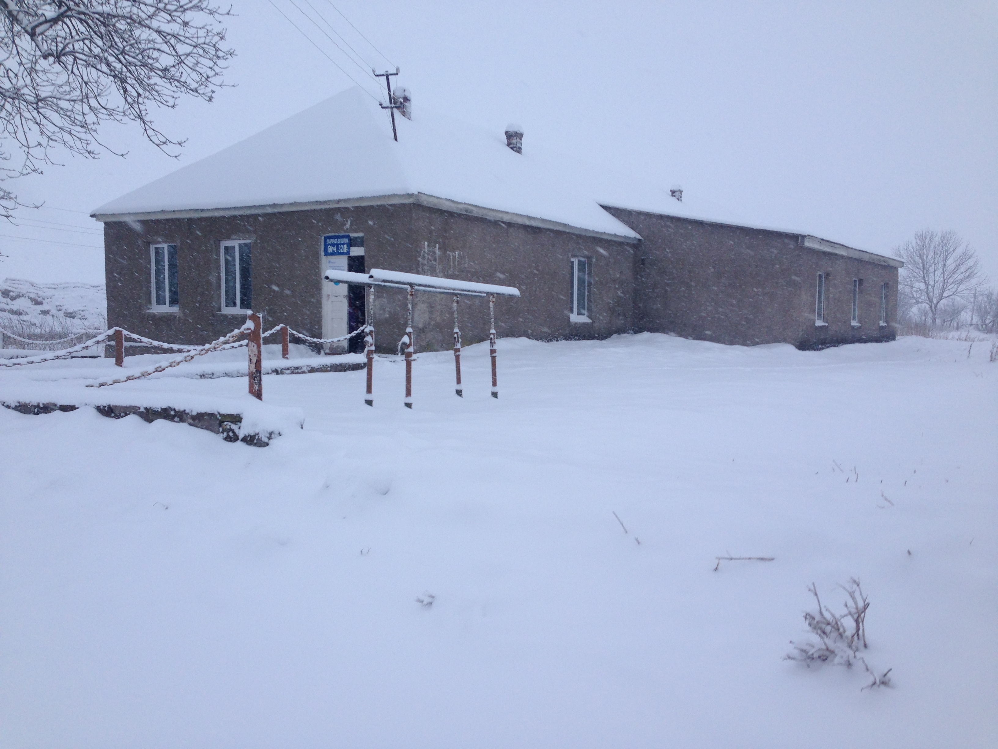 Բլագոդարնոյե գյուղի հիմնական դպրոցը՝ ձմռան ամիսներին